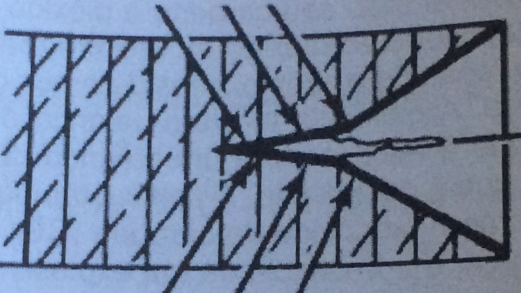 efeito monroe